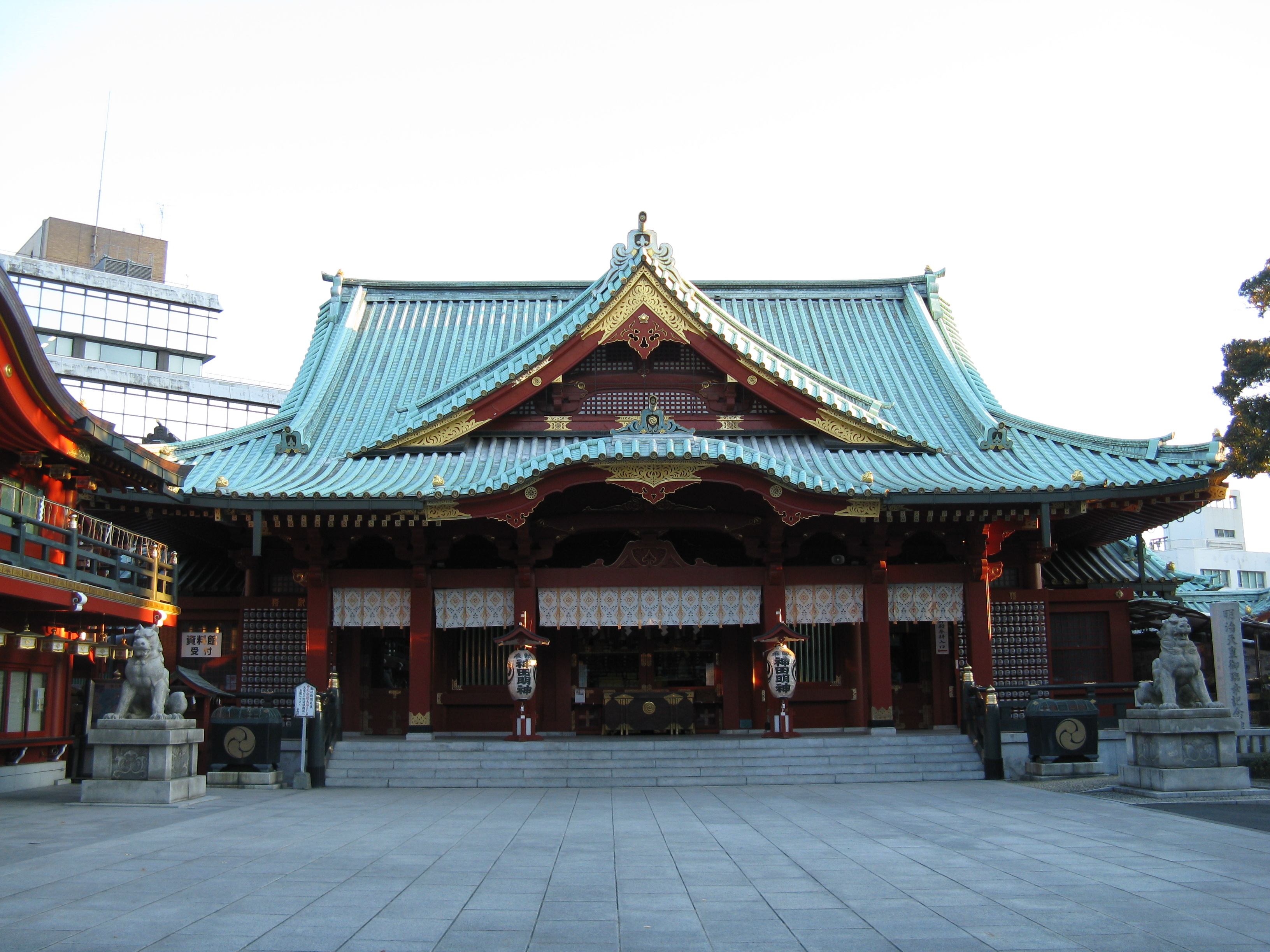 神田明神 社殿